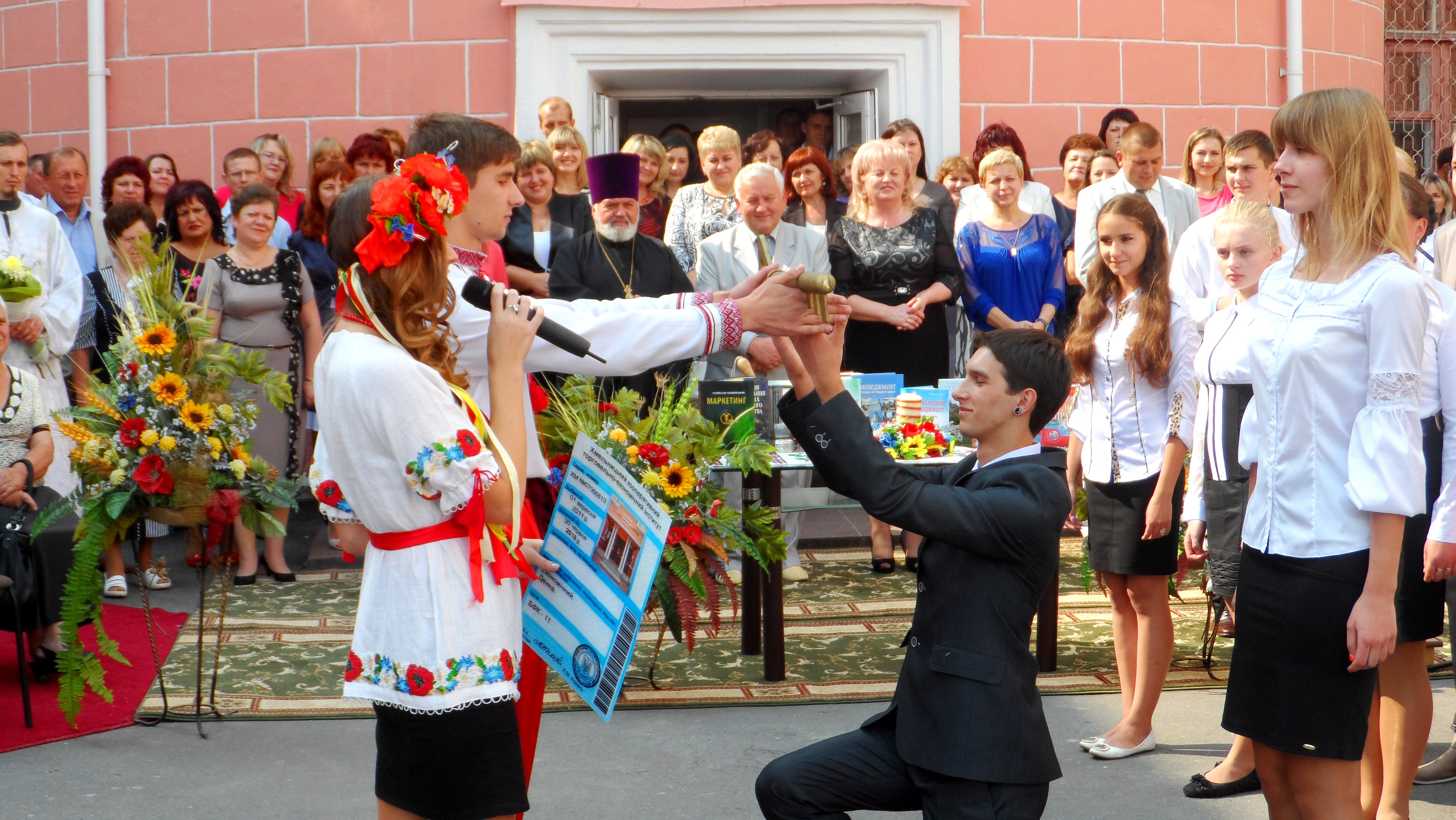 Церемонія передачі ключа знань у ХКТЕІ - 2013 рік